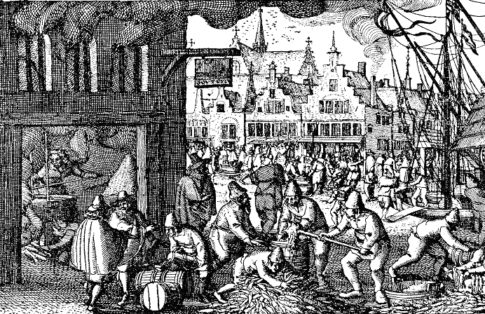 Het zoutzieden en haringpakken aan de Haringpakkerij (nu Prins Hendrikkade), Amsterdam. Gravure. Begin 17e eeuw. Verblijfplaats onbekend.